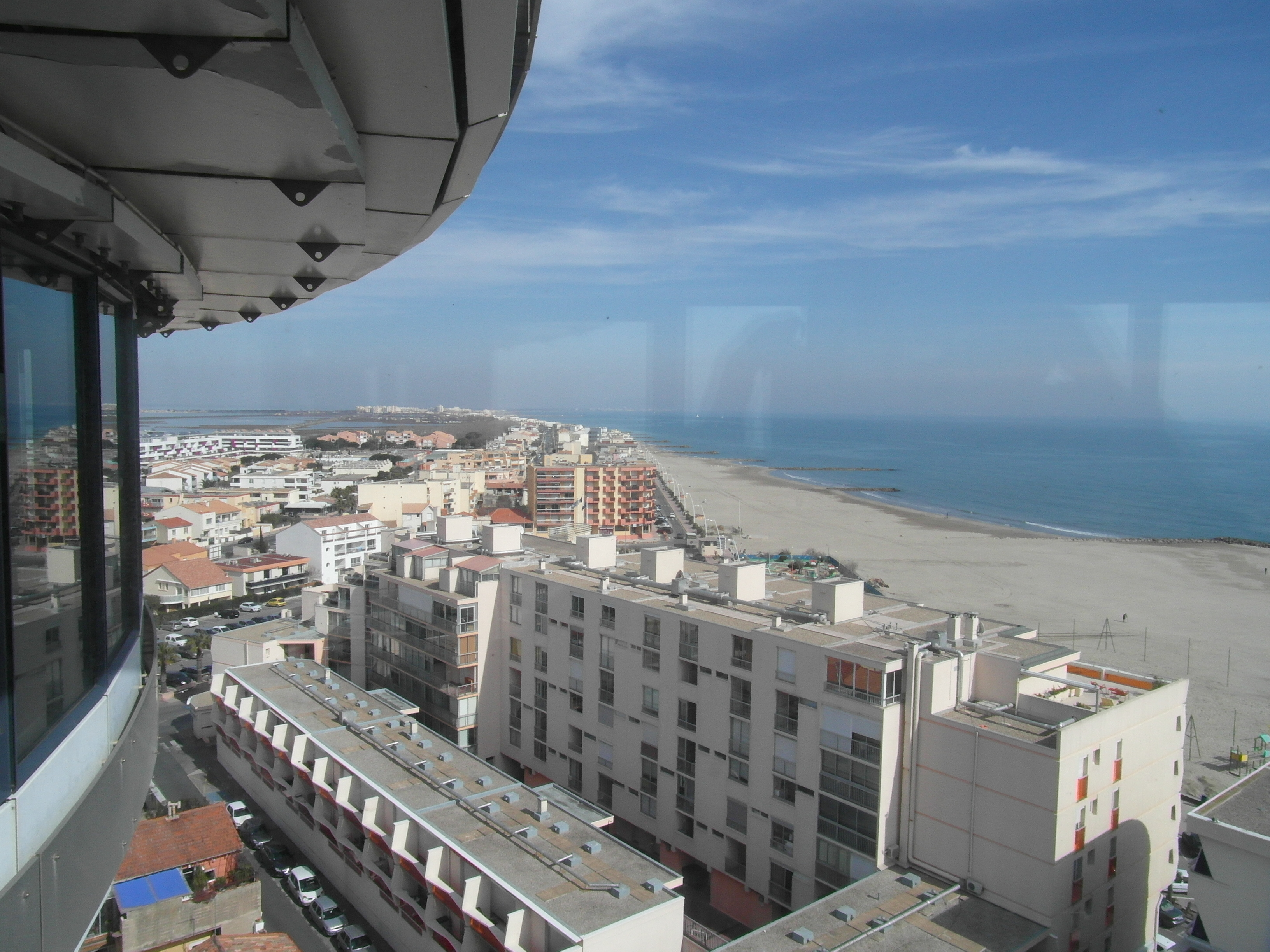 La mer depuis le Phare de la Méditerranée.JPG